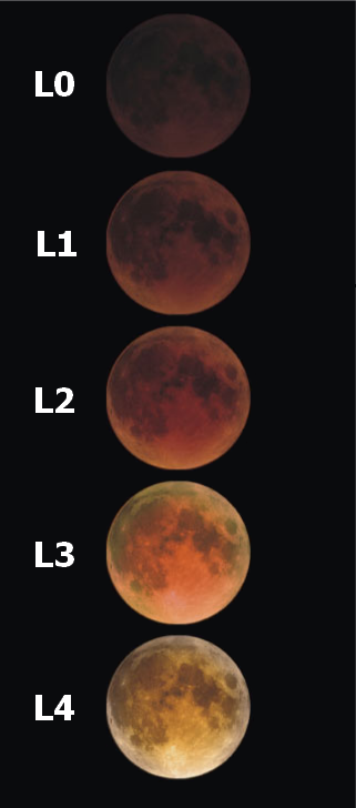 Valores que adopta el oscurecimiento de la Luna durante un eclipse, medido mediante la Escala de Danjon. L=0: Eclipse muy oscuro, Luna casi invisible en la semitotalidad. L=1: Grises oscuros o parduscos, pocos detalles visibles. L=2: Rojizos o rojos parduscos con área central más oscura, regiones externas muy brillantes. L=3: Rojo ladrillo, frecuentemente con un margen amarillento. L=4: Anaranjado o cobrizo, muy brillante, a veces con un margen azulado.